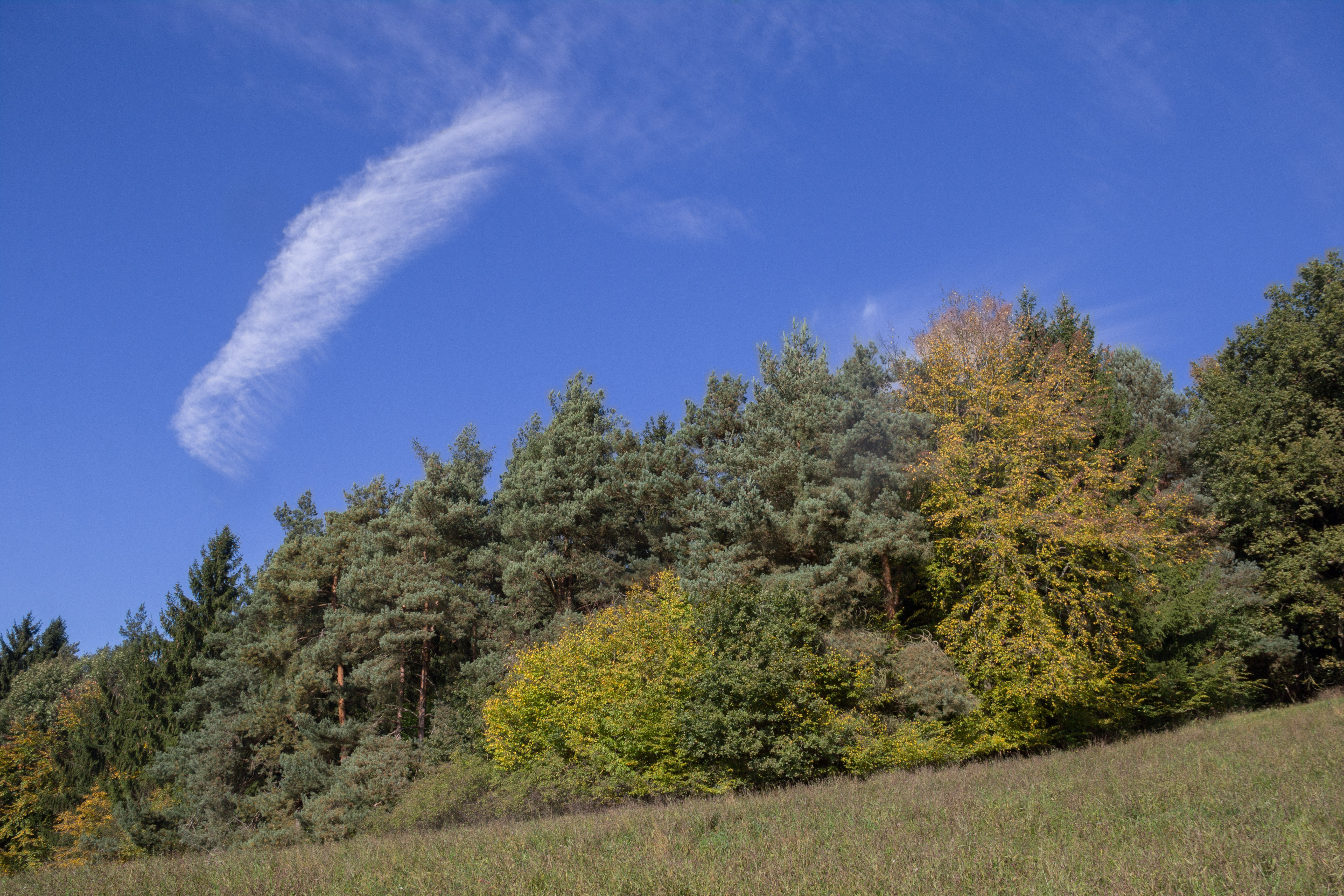 Schlüpfelberg, Mühlhausen, LSG Sulzbürg mit Schlüpfelberg